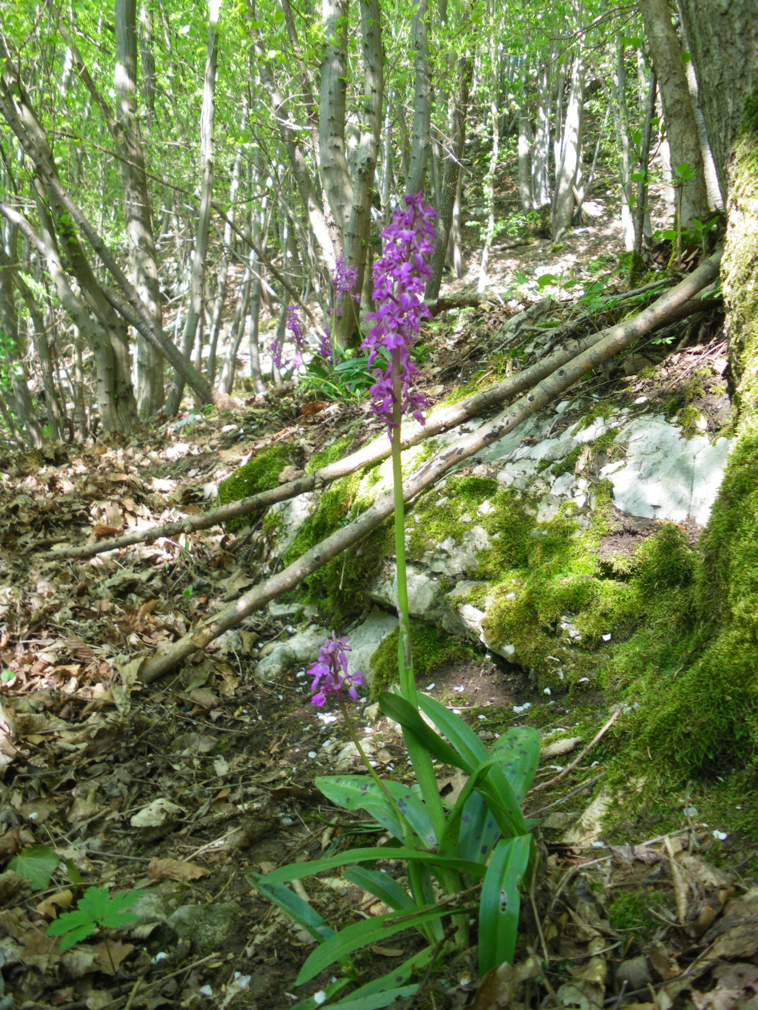 Roche-aux-faucons, le vendredi 24/04/2009